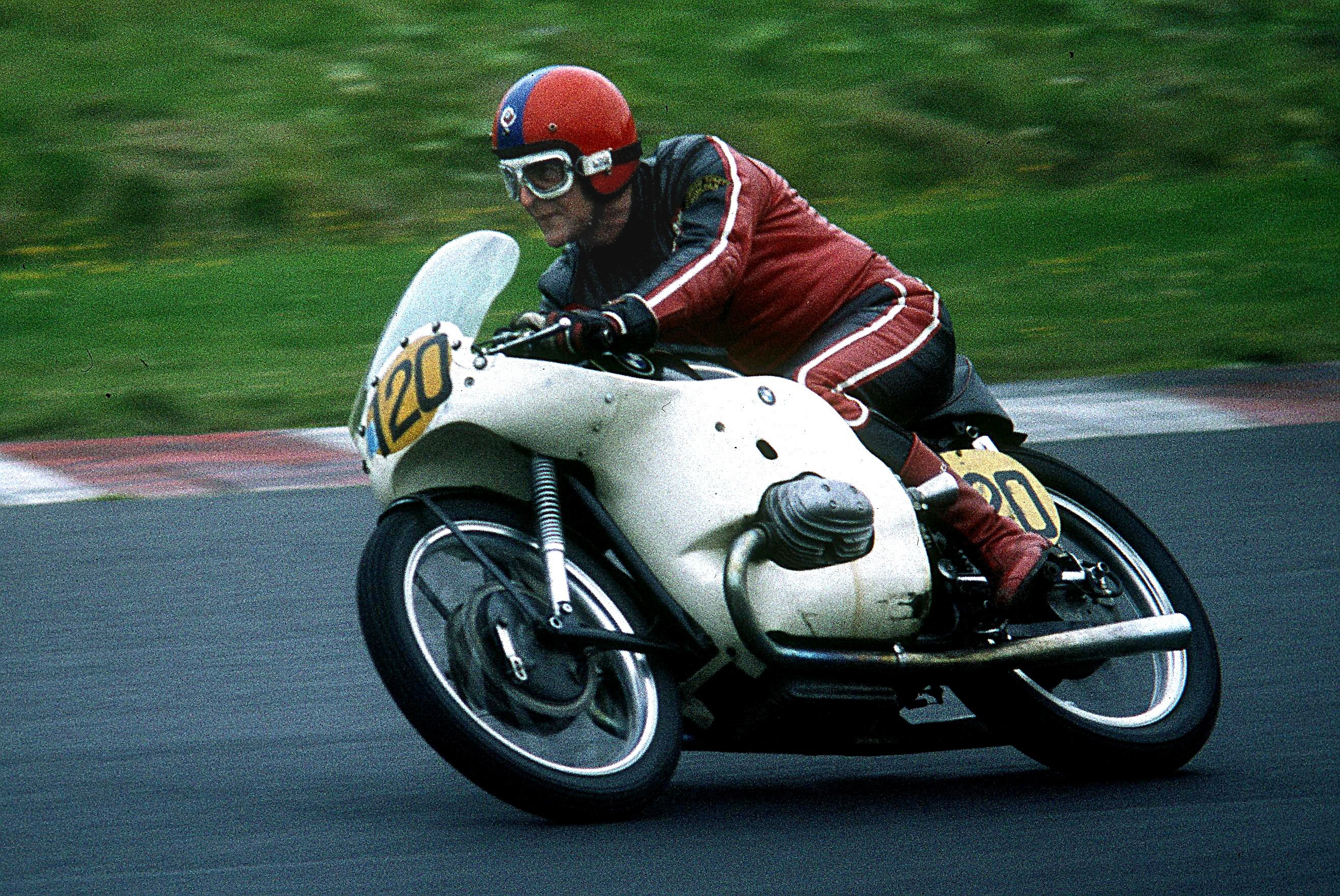 Walter Zeller auf BMW RS 54 beim Oldtimer-Grand-Prix 1979 in der Südkehre des Nürburgrings